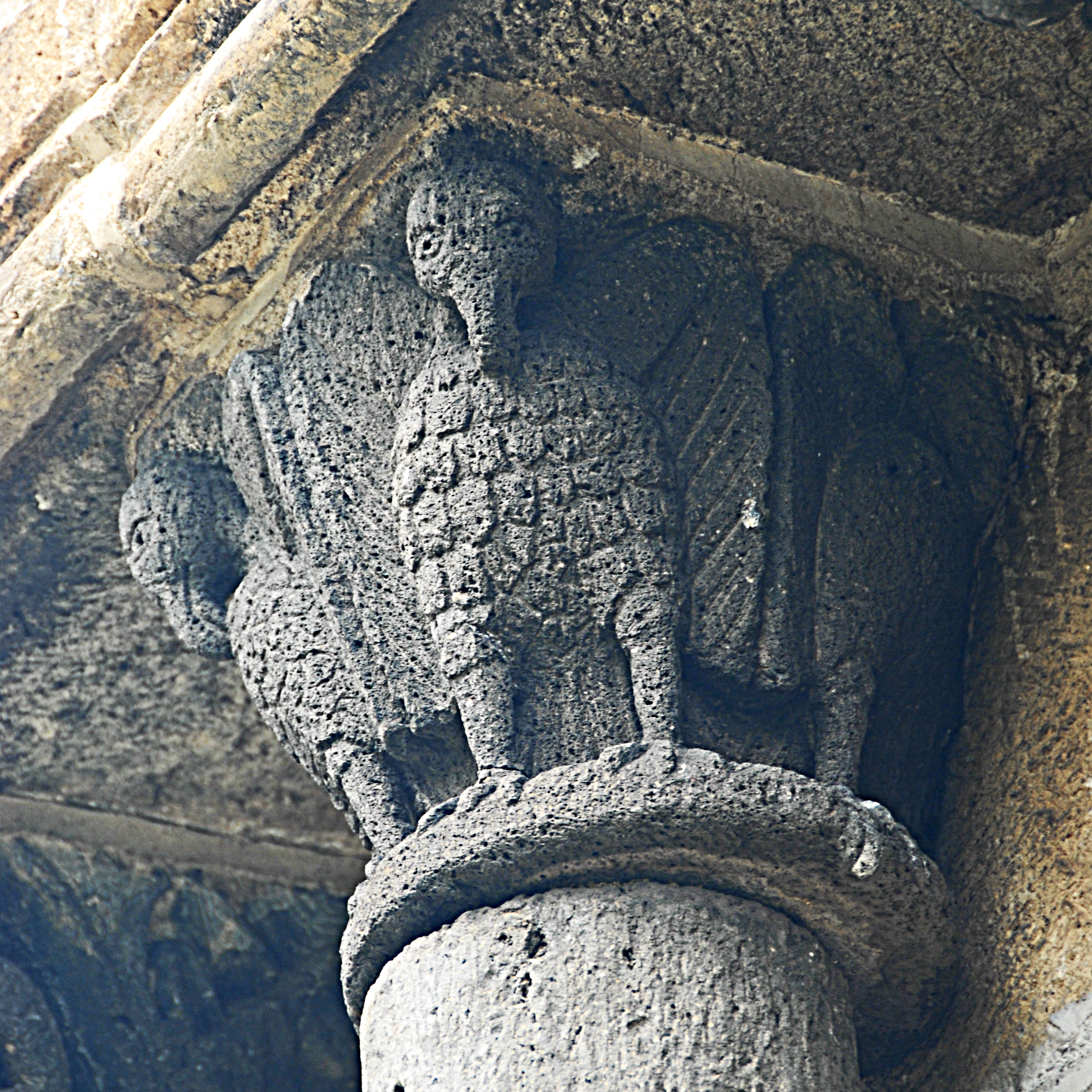 Chambon-sur-Lac, Friedhofskapelle, Kapitell, Adler/Pelikan